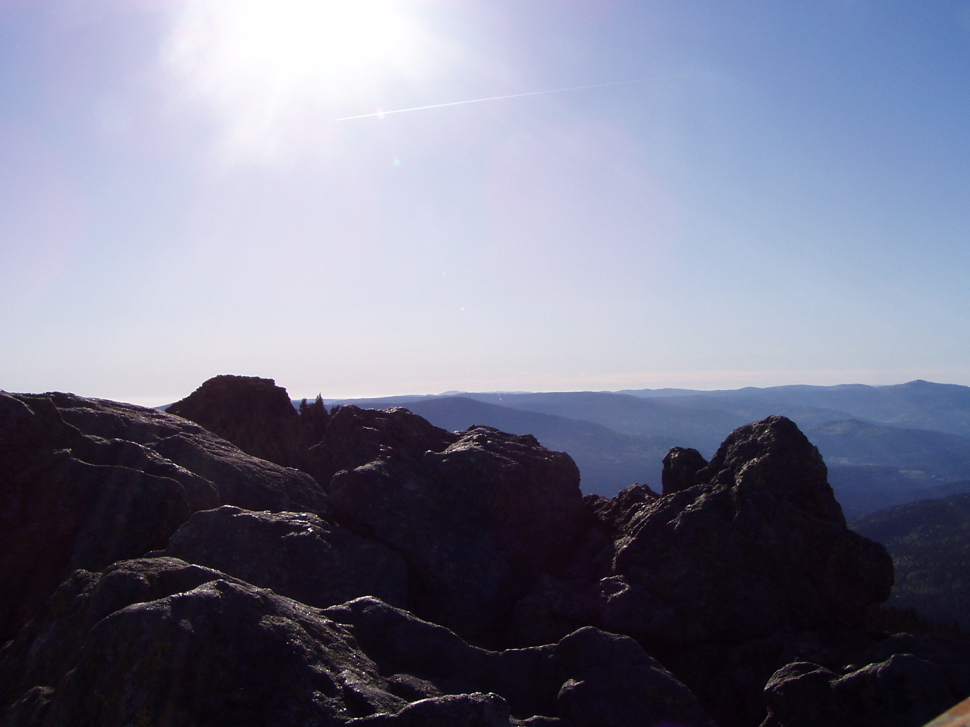 Richard-Wagner-Kopf des Großen Arber mit dem Großen Rachel im Hintergrund am rechten Bildschirmrand